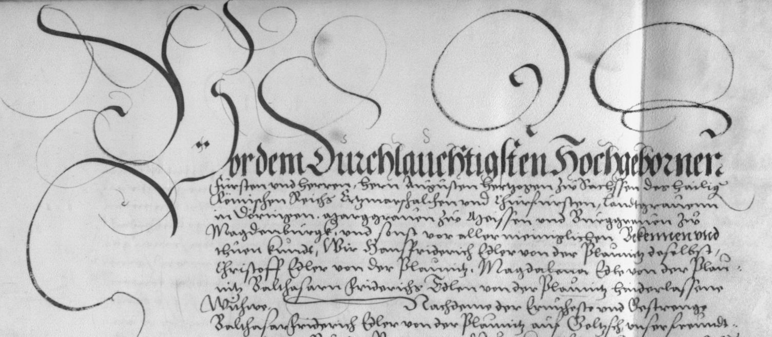 Verkauf der Orte Schönheide, Stützengrün und Neustädtel sowie großer Wälder aus dem Besitz von Balthasar Friedrich Edler von der Planitz an den Kurfürsten August von Sachsen im Jahr 1563. Ausschnitt aus der ersten Seite des Kaufbriefs vom 23. Dezember 1563 (Archivalie). Der Vertragstext ist auch abgedruckt in Gottfried August Arndt: Archiv der Sächsischen Geschichte, 2. Teil, Leipzig 1785, S. 367-388 - Wortlaut des Vertrages vom 23. Dezember 1563 über den Verkauf der Besitzungen des Balthasar Friedrich Edler von der Planitz sowie Bericht des Amtmanns Hans Todt vom Amt Schwarzenberg über die Besichtigung der Besitzungen Digitalisat, abgerufen am 3. Juli 2014